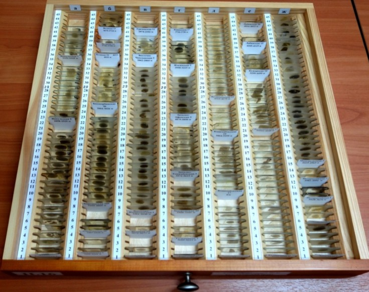 Деревянный ящик со шлифами.